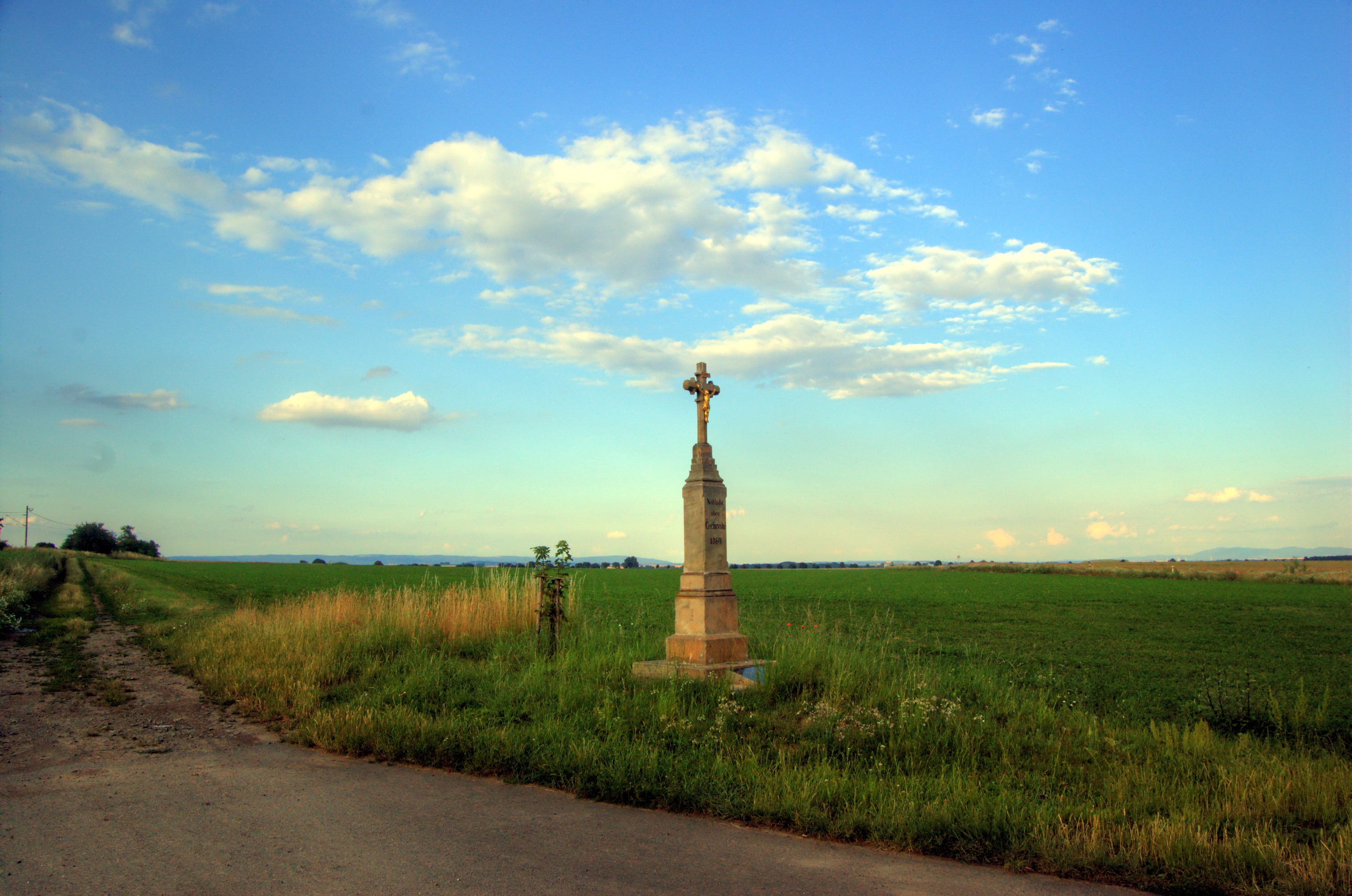 Kříž v poli, Čechůvky, Prostějov